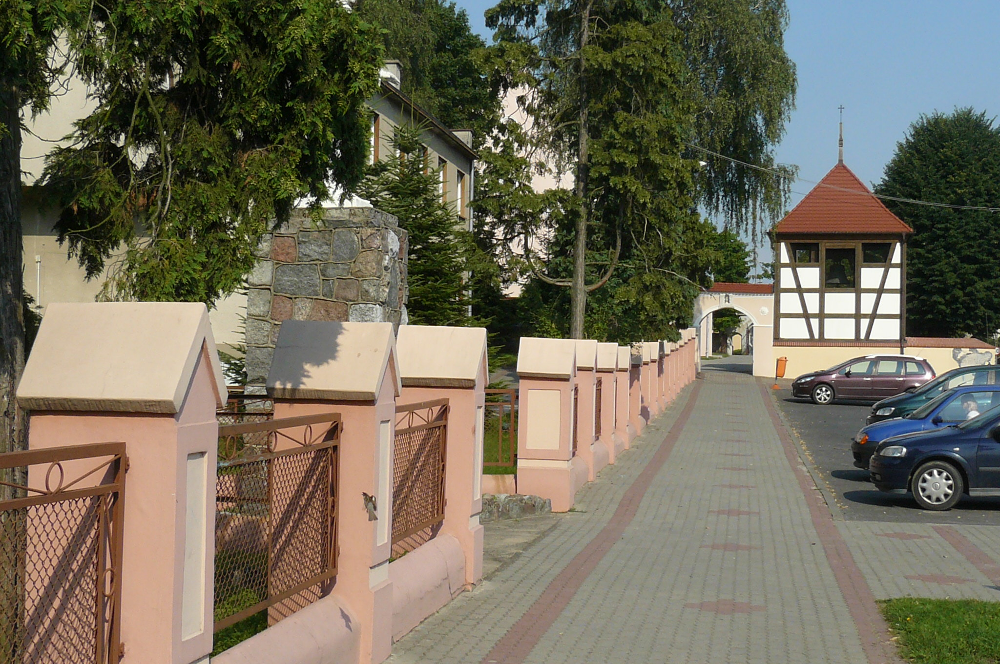 Wysoka.